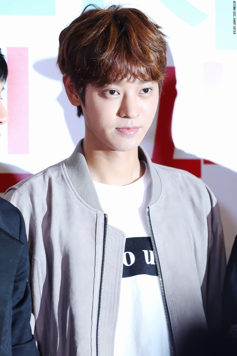 160511 영화 '엽기적인그녀2' VIP시사회에서의 정준영.